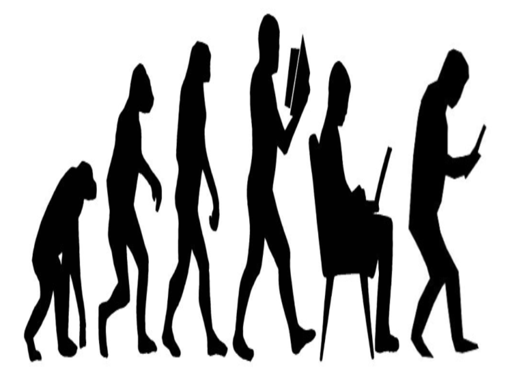 Parodie de la marche du progrès, depuis le singe jusqu'au smombie.